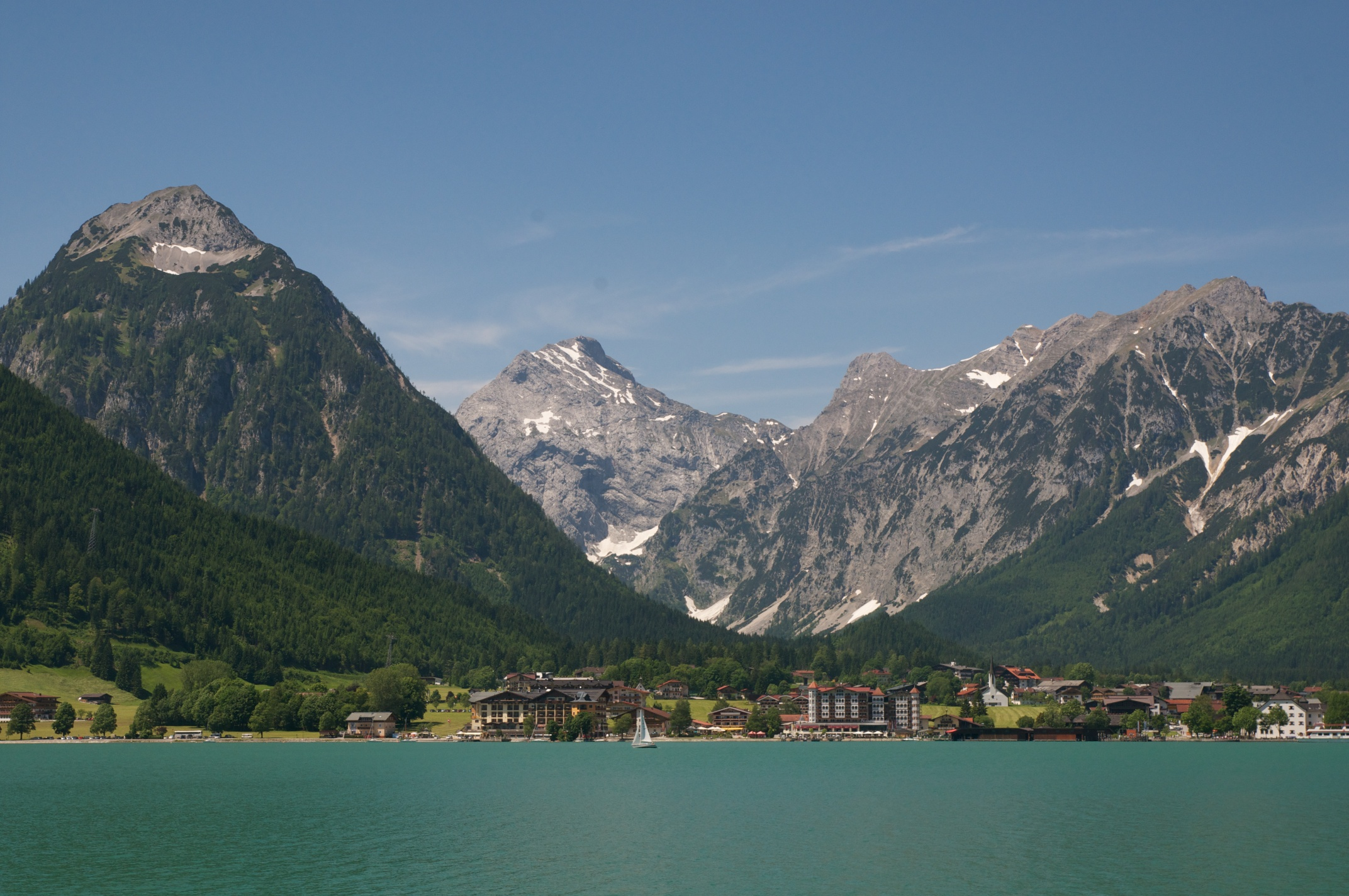 Pertisau (Tirol) vom Achensee aus gesehen